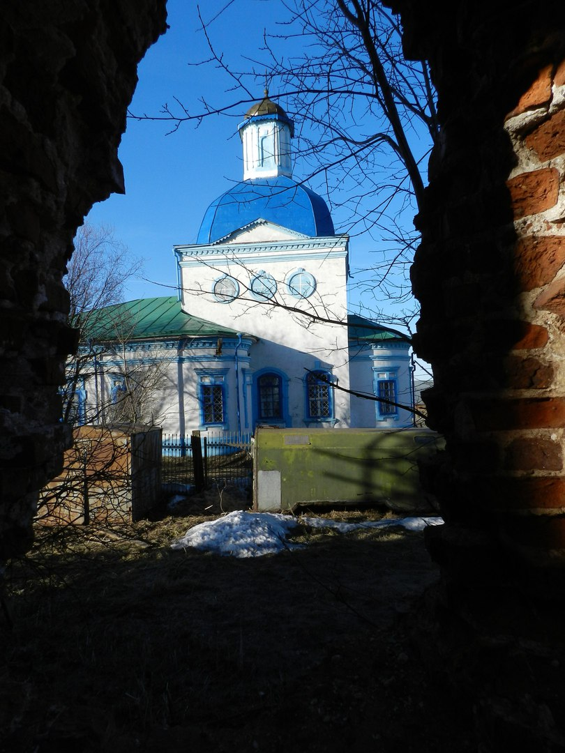 Храм свв. Иоакима и Анны. Вид из окна Воскресенской церкви